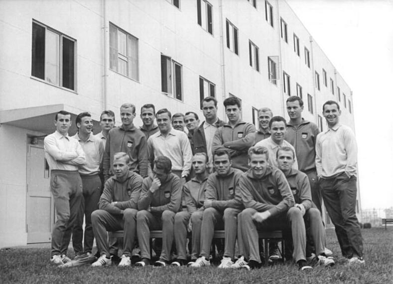 Zentralbild-Kohls Ma-Schä 6.10.1964 XVIII. Olympische Sommerspiele Tokio 1964. Die DDR -Fußballmannschaft vor ihrer Unterkunft (Block 13, 4. Stock im Olympischen Dorf.